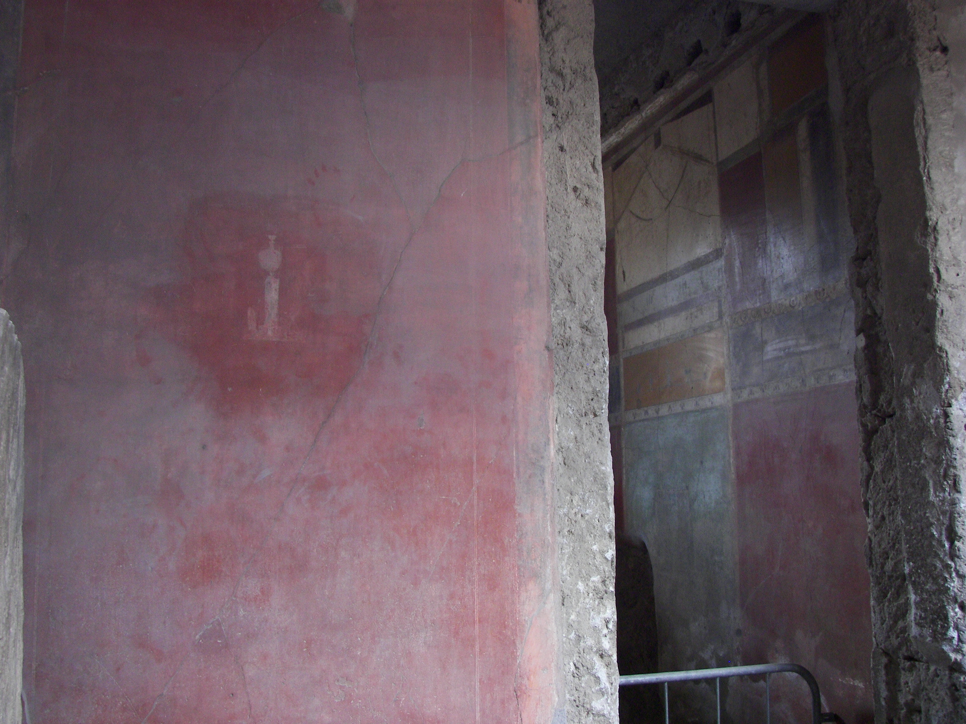 Casa dei Cei in Pompeii.